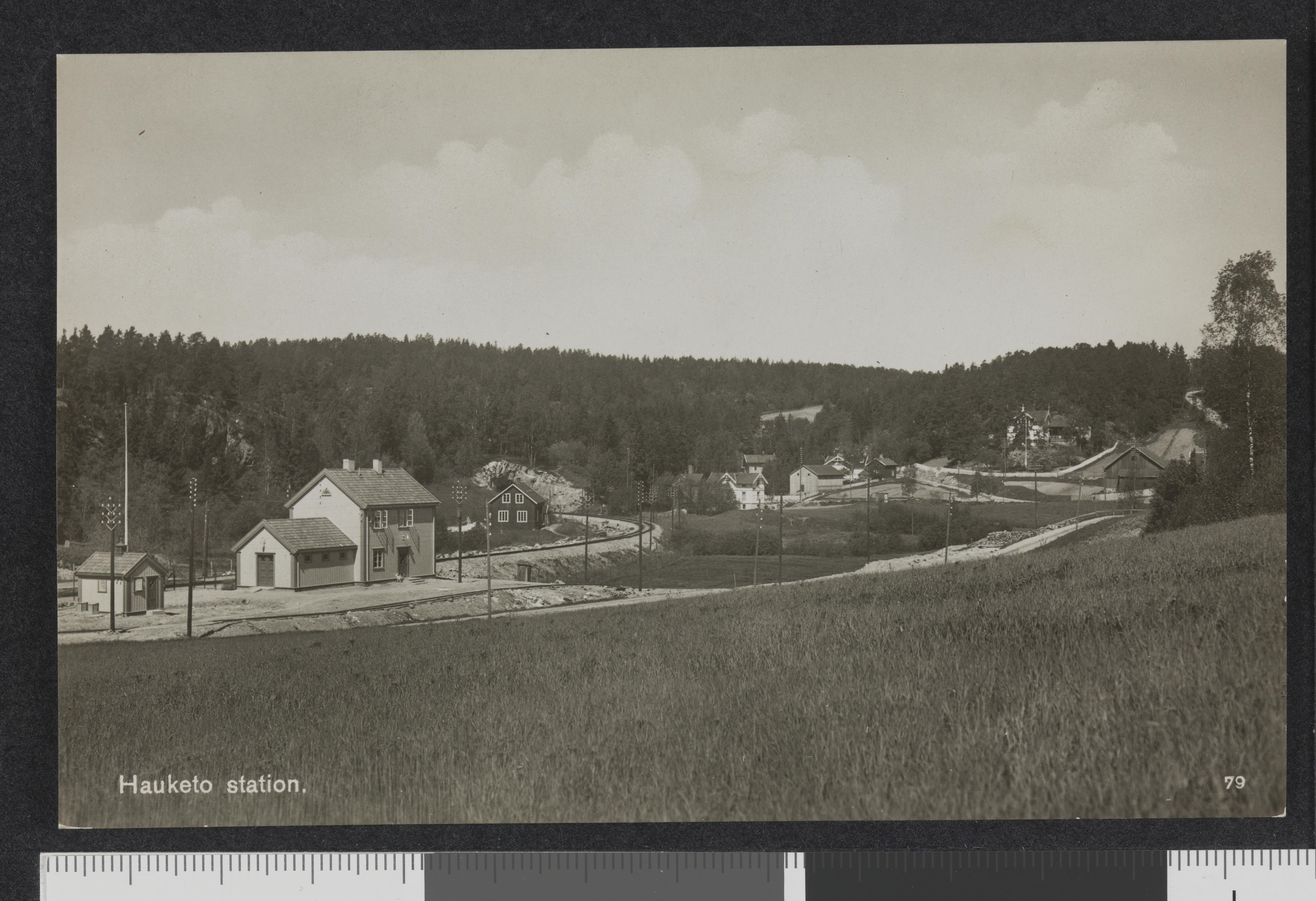 Bildet er hentet fra Nasjonalbibliotekets bildesamling Hauketo,Hauketo stasjon, Oslo, Oslo